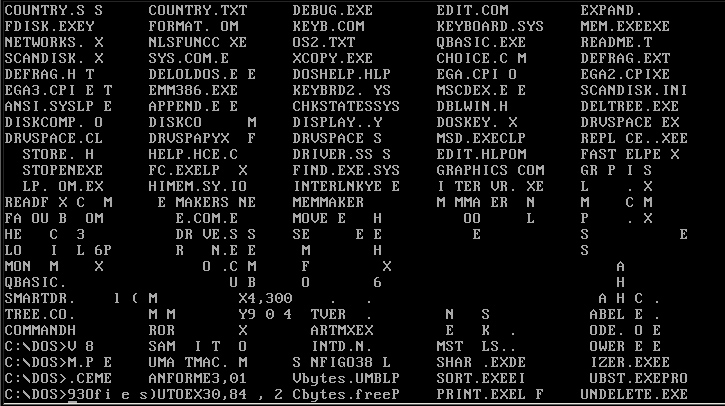 Herbstlaubvirus